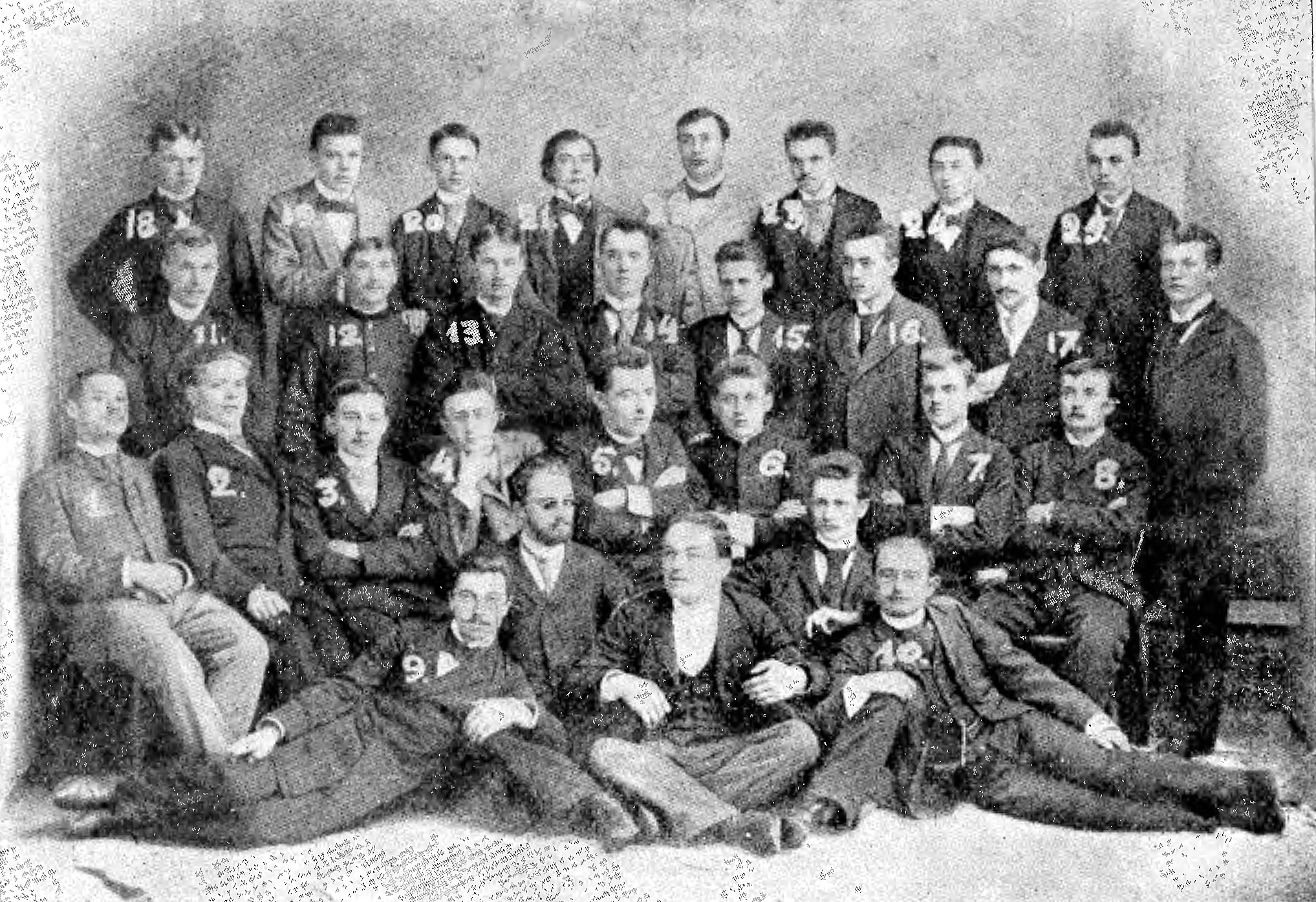 Więźniowie w procesie tarnopolskim (1895): 1. Wincenty Chabin, 2. Tomasz Krzyworączka, 3. Adolf Pfützner, 4. Kazimierz Kahane, 5. Wacław Borzemski, 6. Leon Chwalibiński, 7. Aleksander Bieniecki, 8. Stanisław Kuna, 9. Adam Klimesz, 10. Józef Moskwa, 11. Edward Kobak, 12. Stanisław Duszyk, 13. Karol Skielski, 14. Stanisław Bieniowski, 15. Rehorowski, 16. Stanisław Włosek, 17. Edward Bałąziński, 18. Kazimierz Balicki, 19. Zygmunt Zubczewski, 20. Marcin Wojnarowicz, 21. Antoni Stryjewski, 22. Antoni Tchórzewski, 23. Józef Sawicki, 24. Karol Kromp, 25. Jan Włosek.